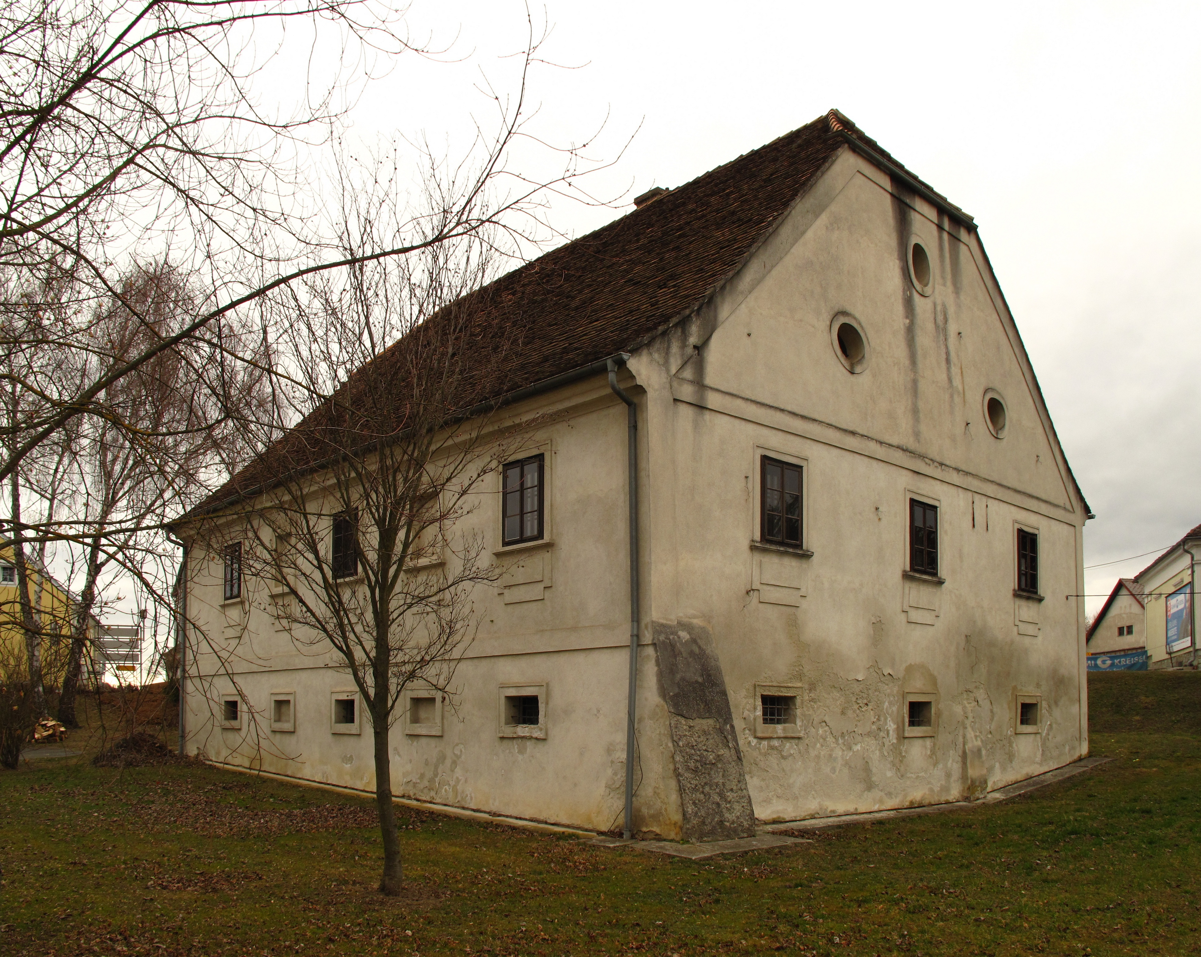 Alte Hofmühle (Auswanderer-/Joseph-Reichl-Museum), Stremtalstraße 2: Gebäudeansicht außen